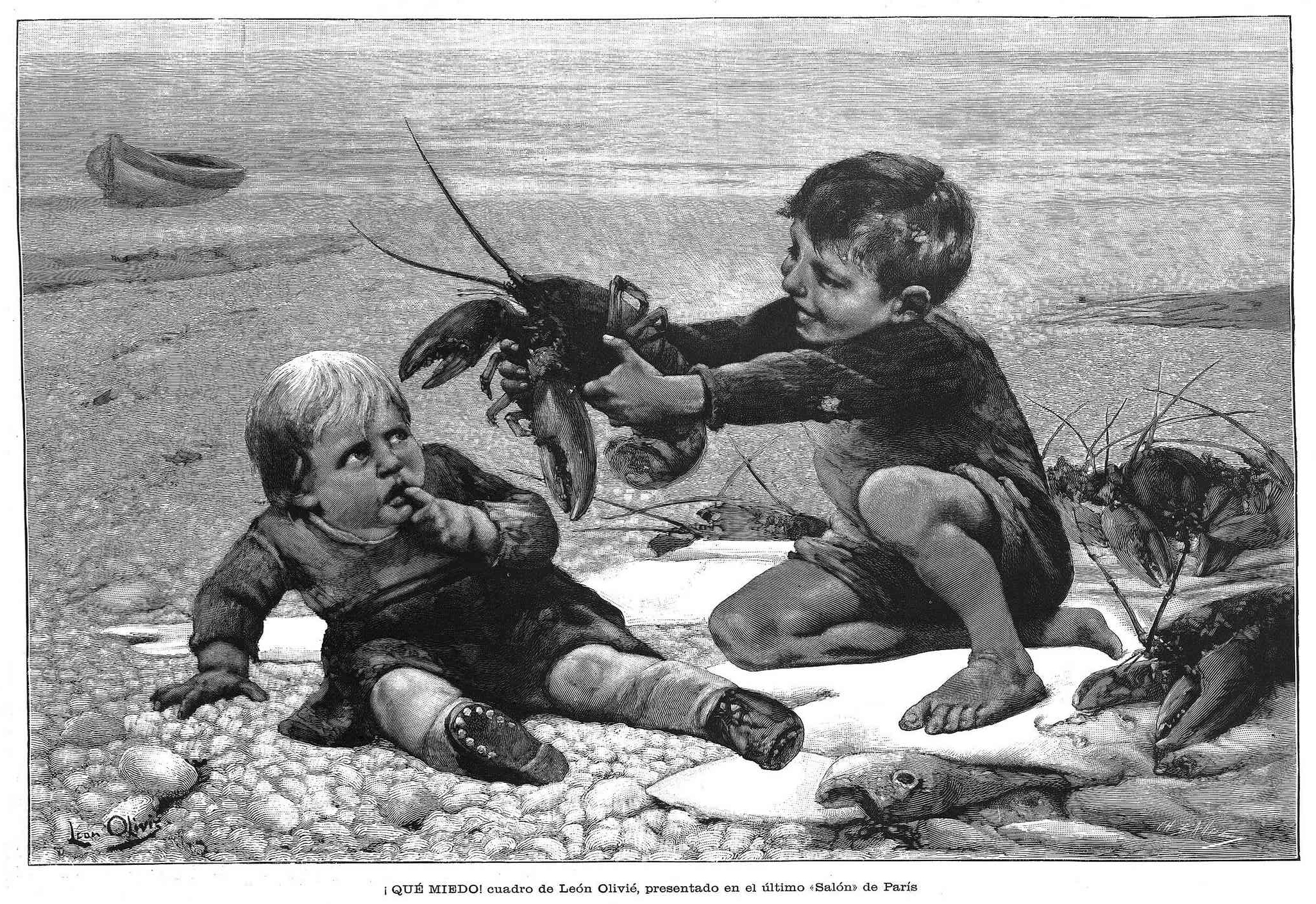 ¡Qué miedo!, cuadro de León Olivié, presentado en el último «Salón» de París, en la revista española La Ilustración Artística.